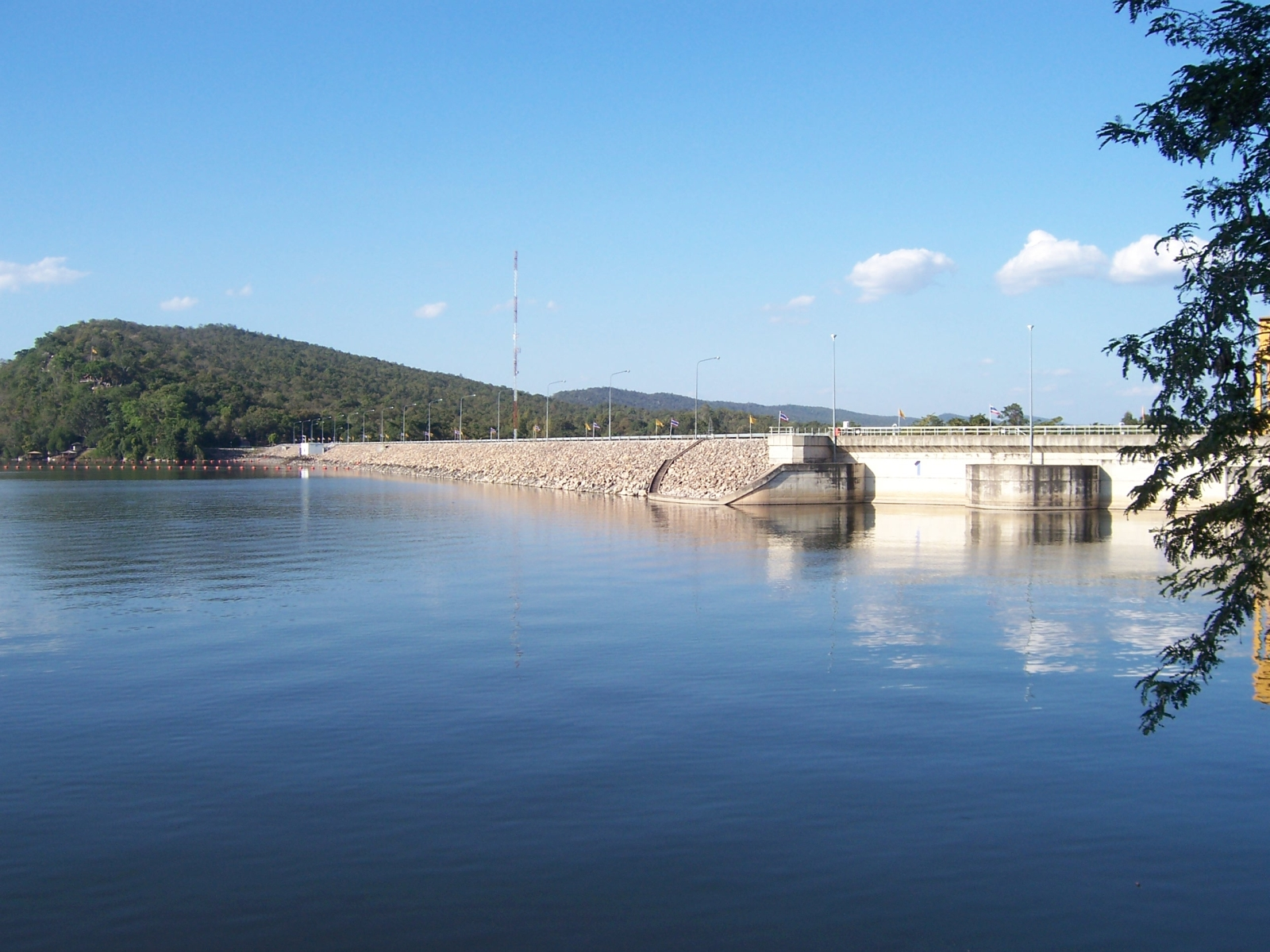 Ubol Ratana Dam, Thailand